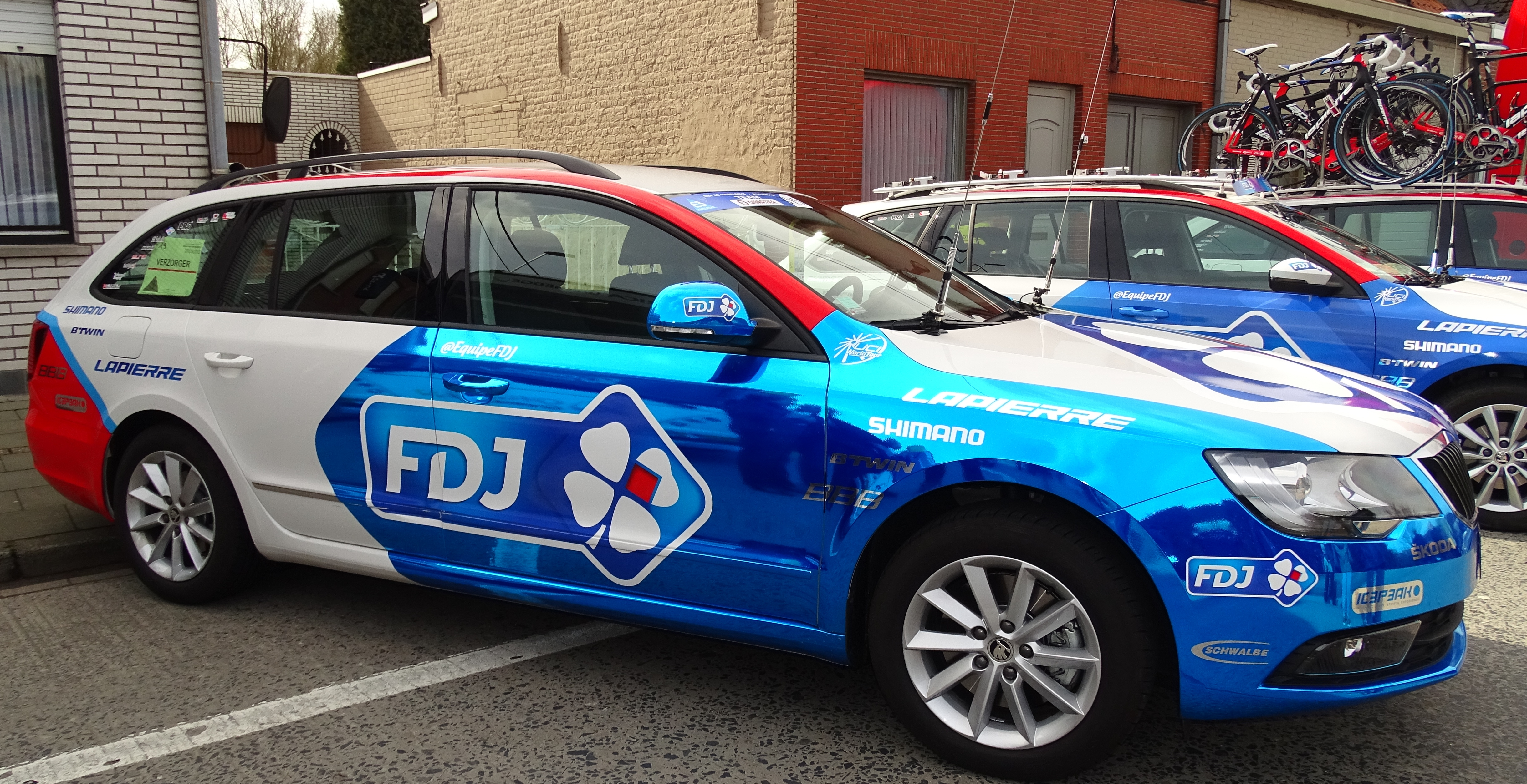 Reportage réalisé le vendredi 27 mars à l'occasion du départ et de l'arrivée du Grand Prix E3 2015 à Harelbeke, Belgique.